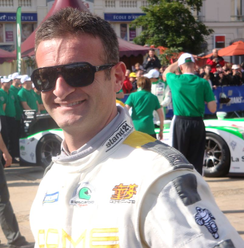 Piote Automobile - Nicolas Minassian au 24h du Mans 2012